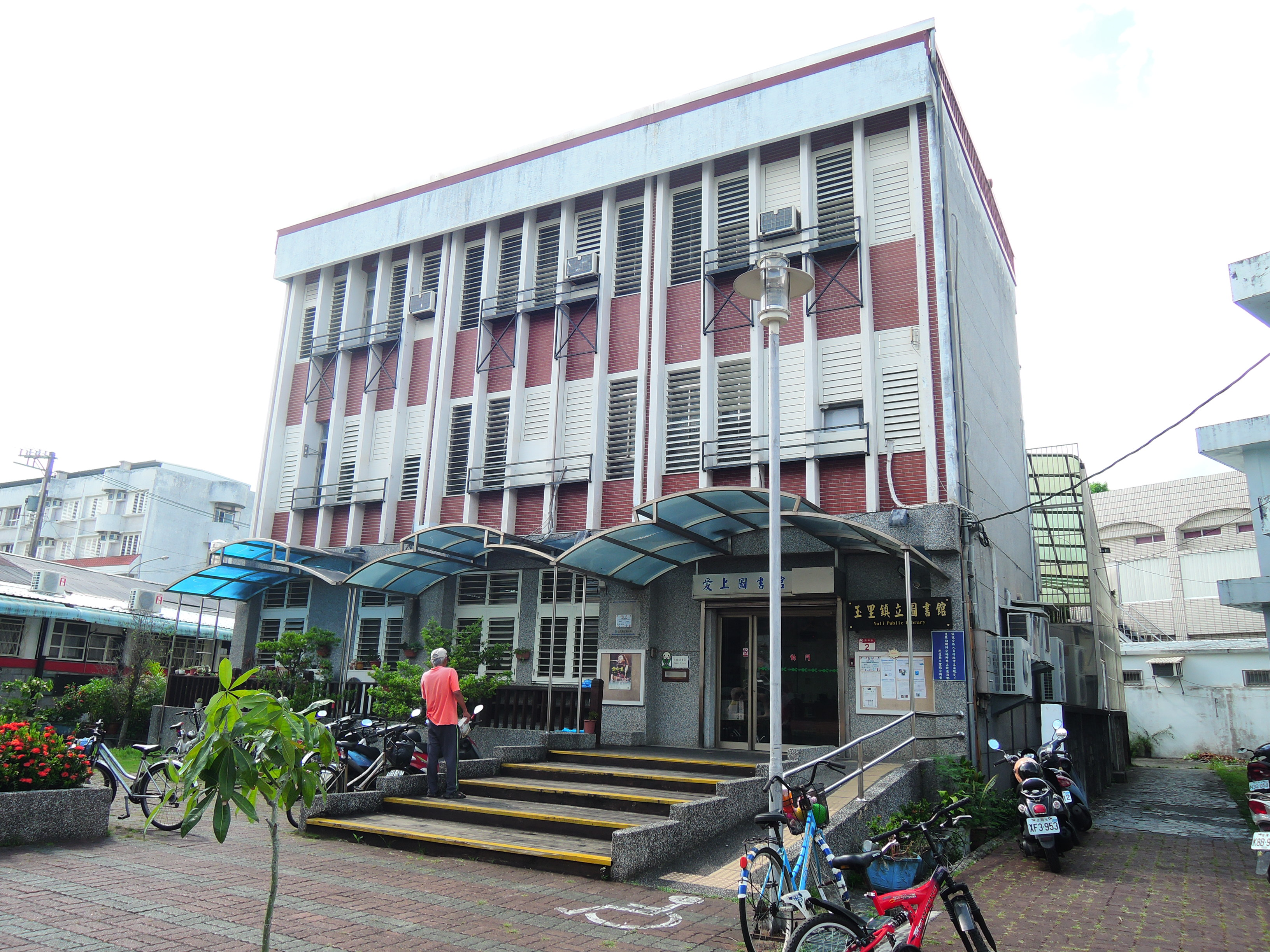 台灣 981 花蓮縣玉里鎮啟模里民族街2號